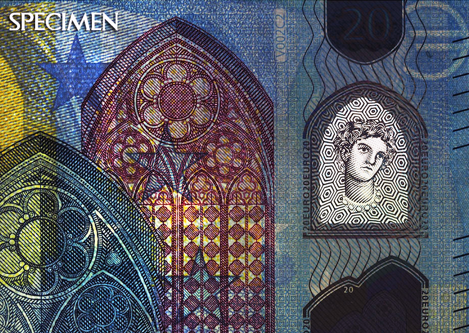 Fotografía de aproximación a detalles de seguridad de billete de veinte €, holografía.